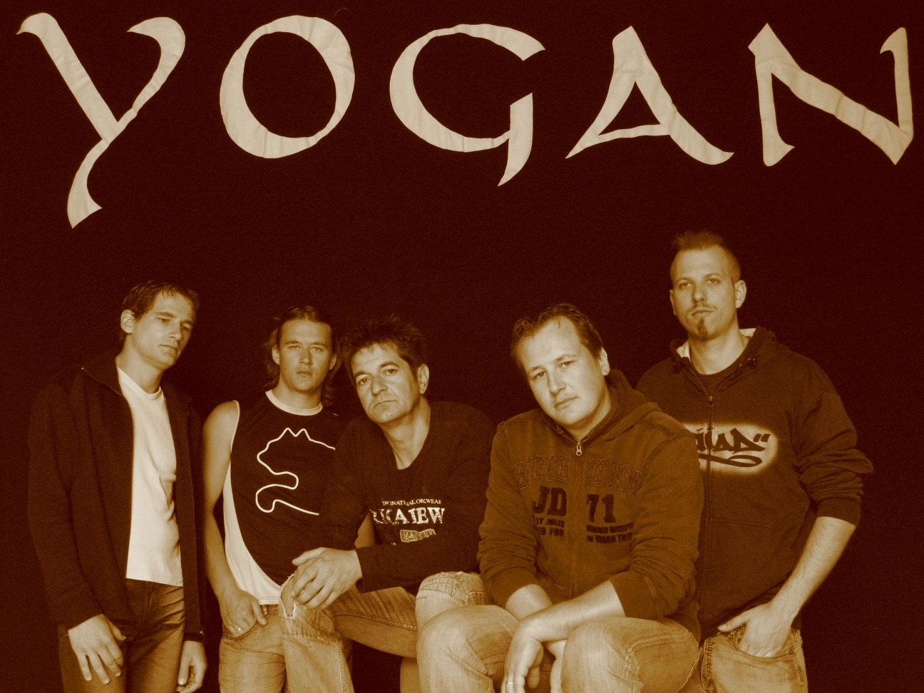 photo du groupe de musique celtique Yogan